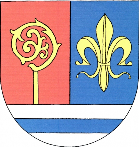 znak, Čistá, okres Svitavy